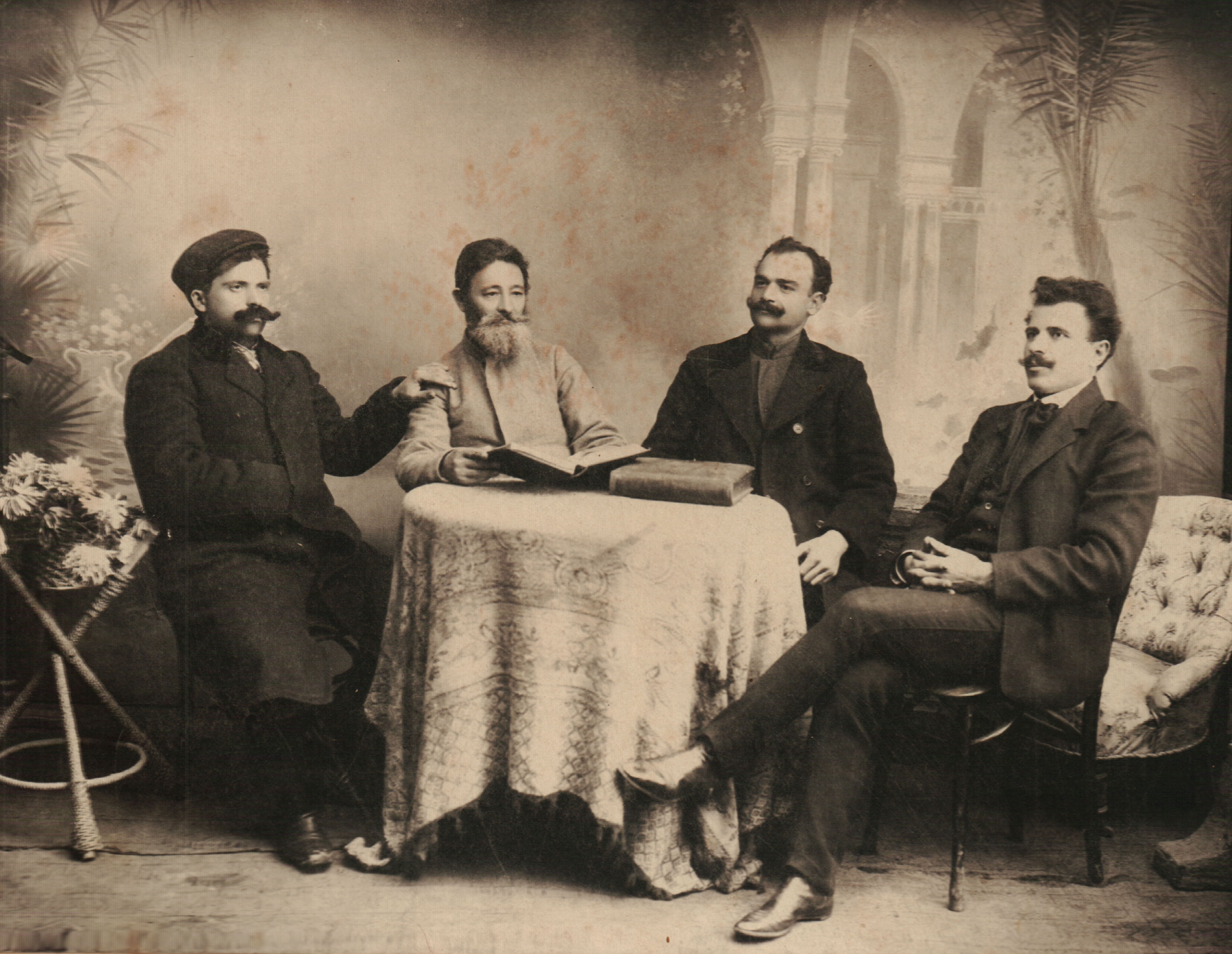 Снимка на Таско Спасов - Таската, дядо Кольо, Д. Зографски и Иван Лазаров